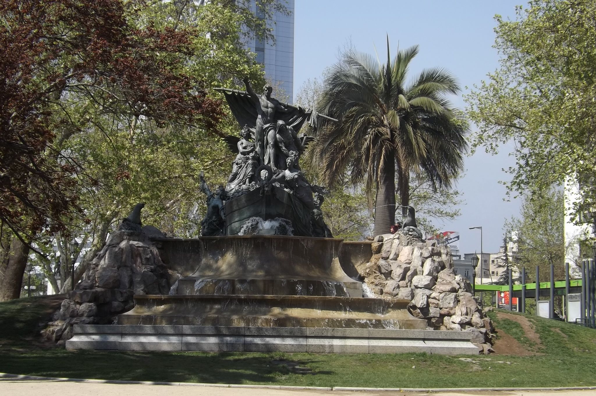 Parque Forestal This is a photo of a national monument in Chile: 419